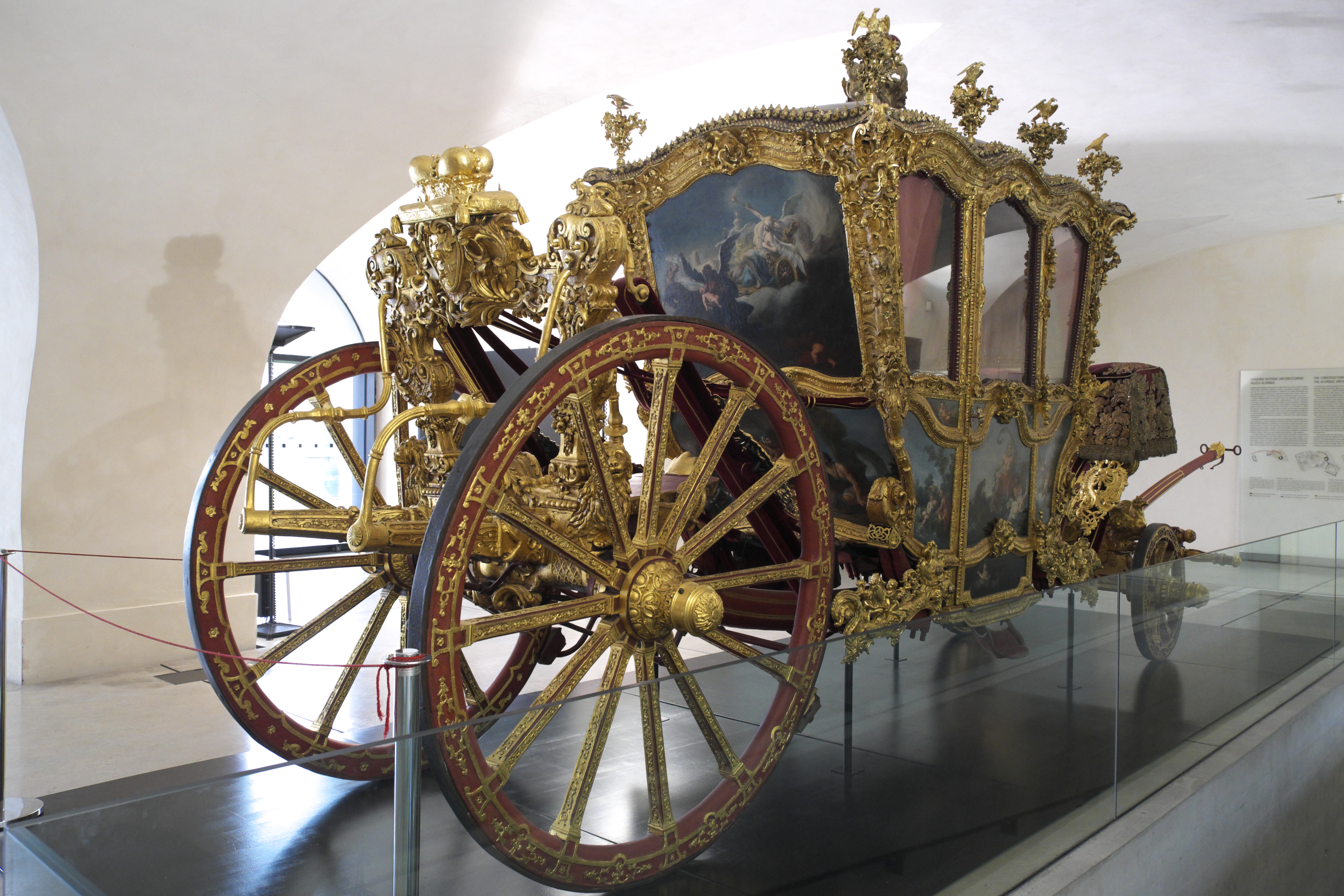 Prunkkutsche des Bischofs Ferdinand Julius von Troyer im Diözesanmuseum Olmütz in Olmütz im Olomoucký kraj (Tschechien)